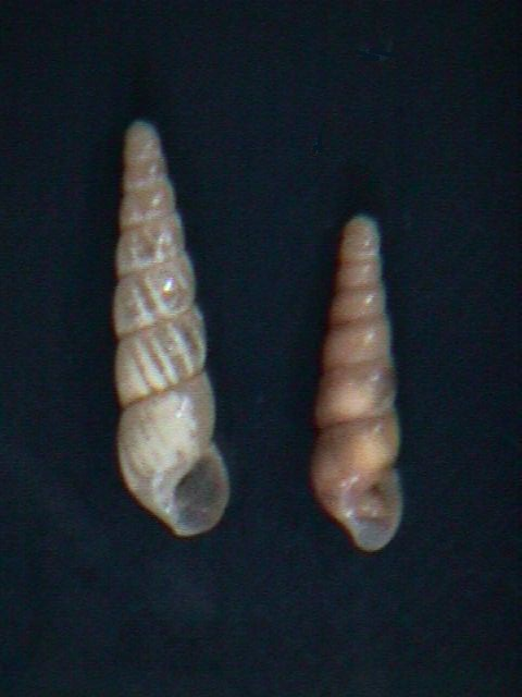 Subulina octona de El Hatillo, Estado Miranda - Venezuela